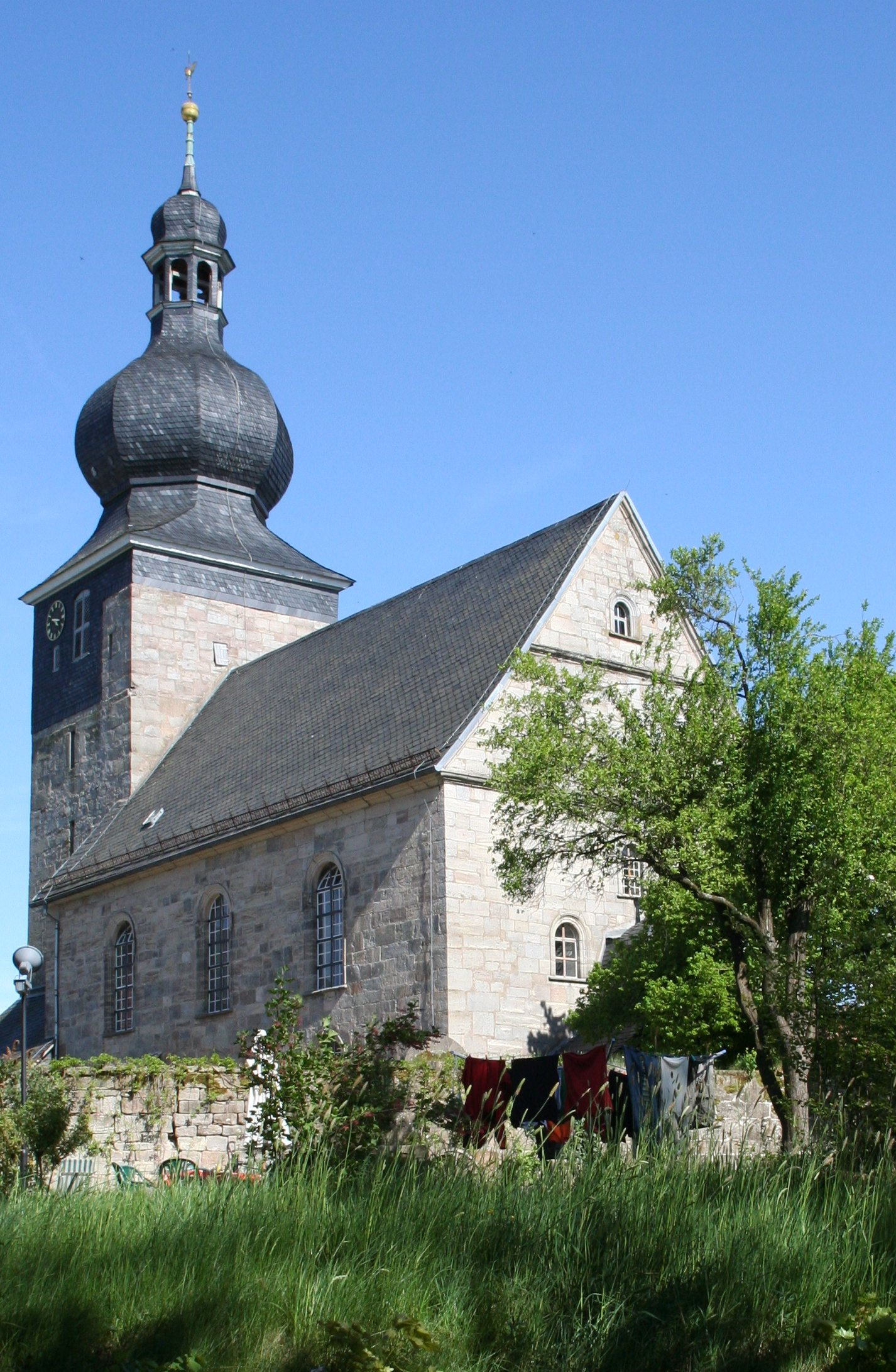 ev. Heilig-Geist-Kircheevangelische Kirche in Mupperg, Gemeinde Föritz, Landkreis Sonneberg